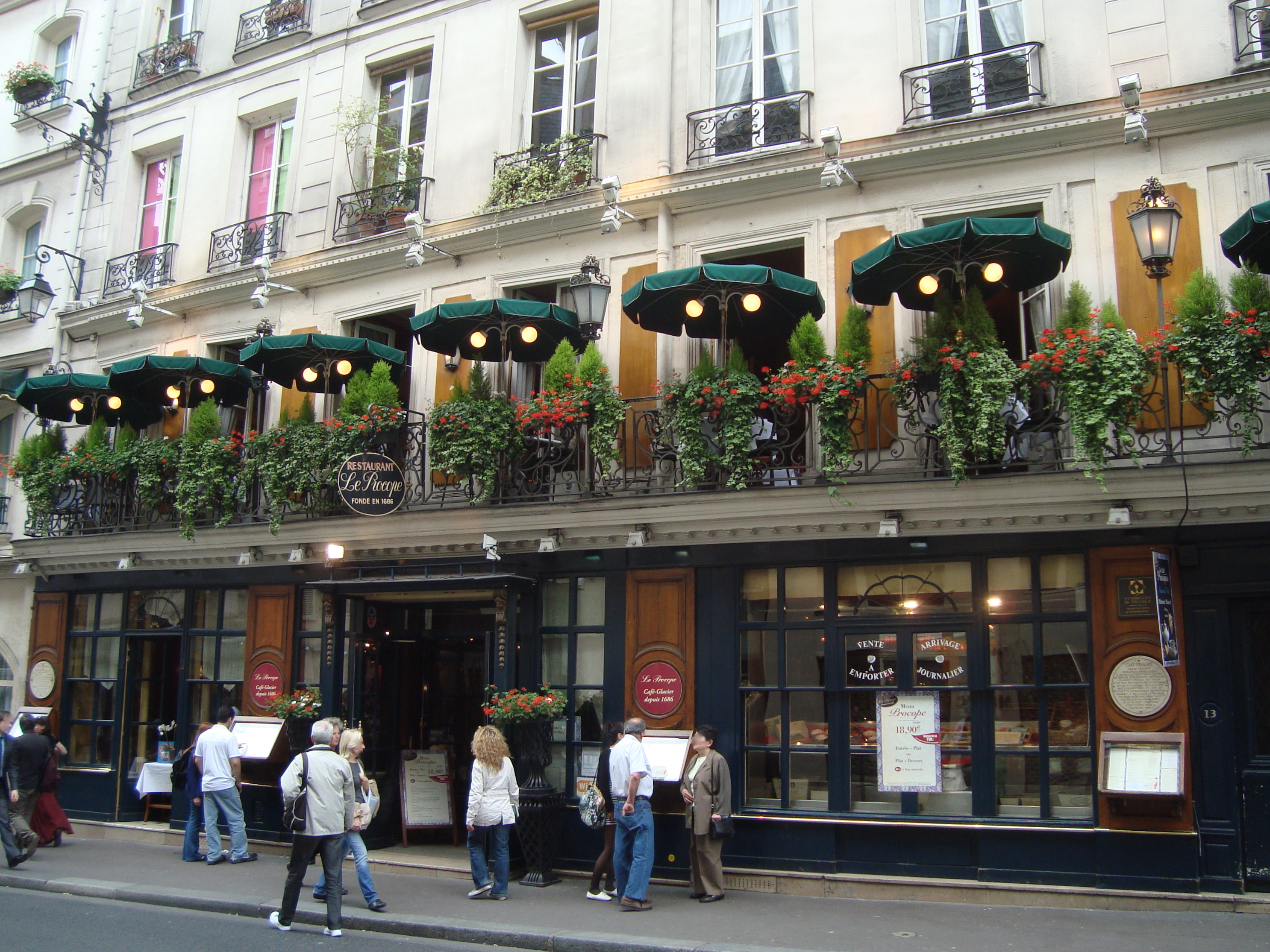 Le Procope, fondé en 1686, rue de l'Ancienne-Comédie à Paris